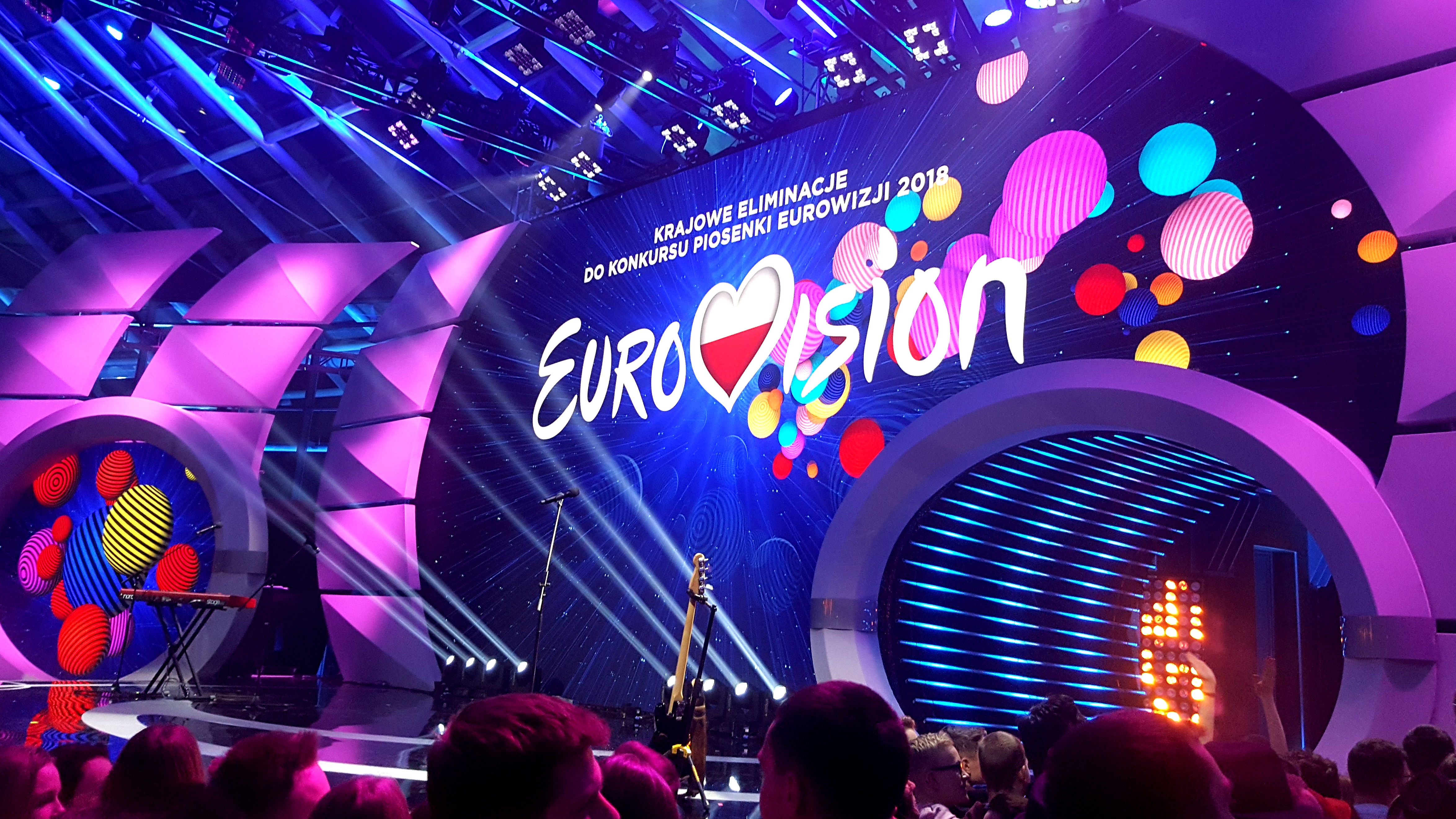 Scena krajowych eliminacji do 63. Konkursu Piosenki Eurowizji 2018.